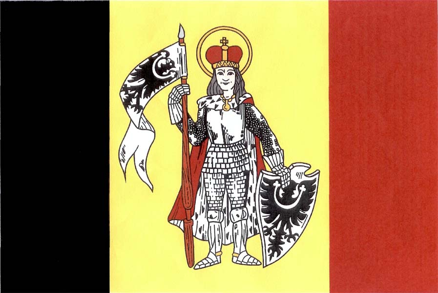 Vlajka obce Levín (okres Litoměřice)